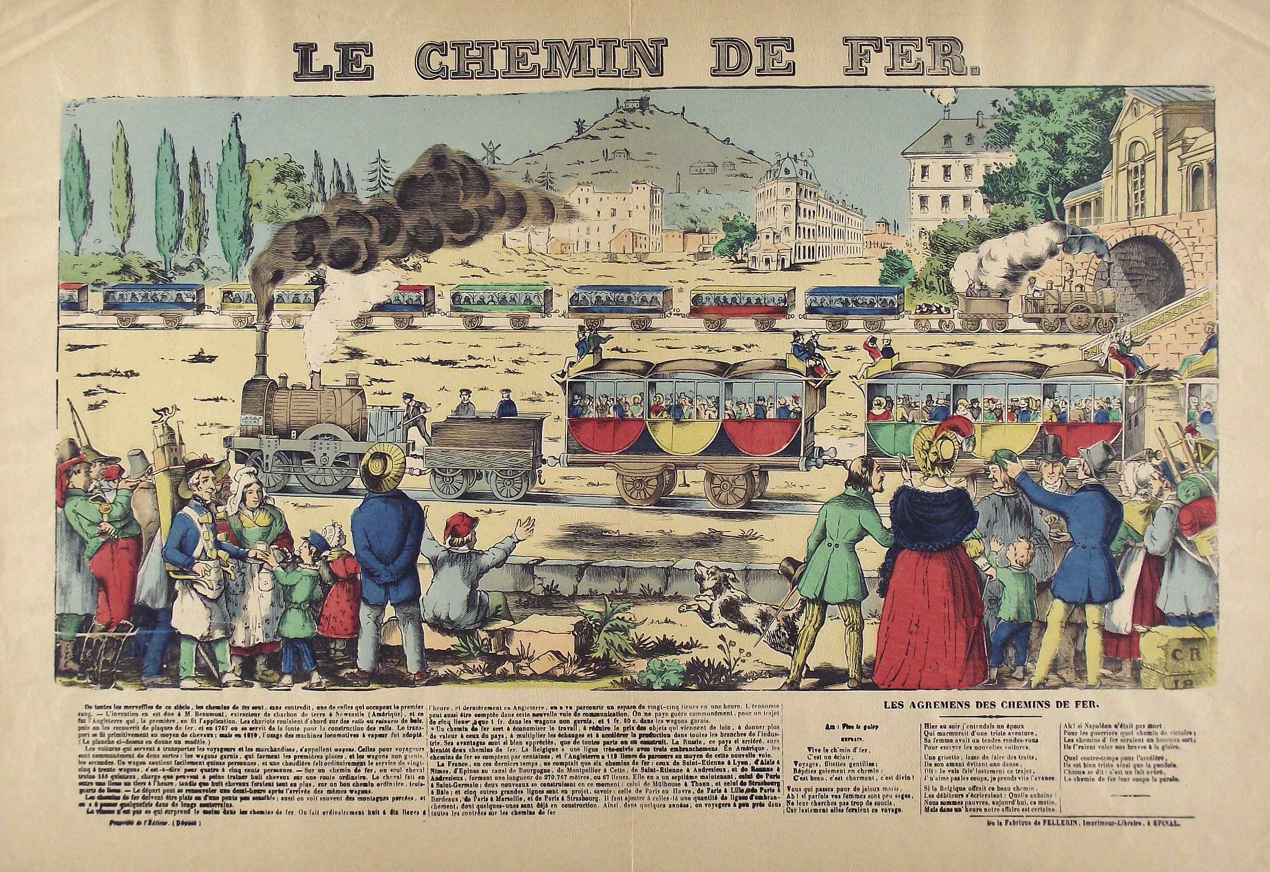 "Le chemin de fer". Holzschnitt, koloriert, aus "Fabrique de Pellerin", Epinal (um 1840). 29,5 x 57, Blatt . 54 x 63,5 cm